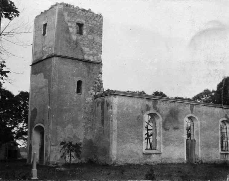 Hackvads kyrka, Närke, efter branden 1902, före restaureringen 1910. Sedd från sydväst.